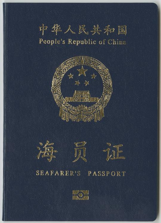 中华人民共和国海员证